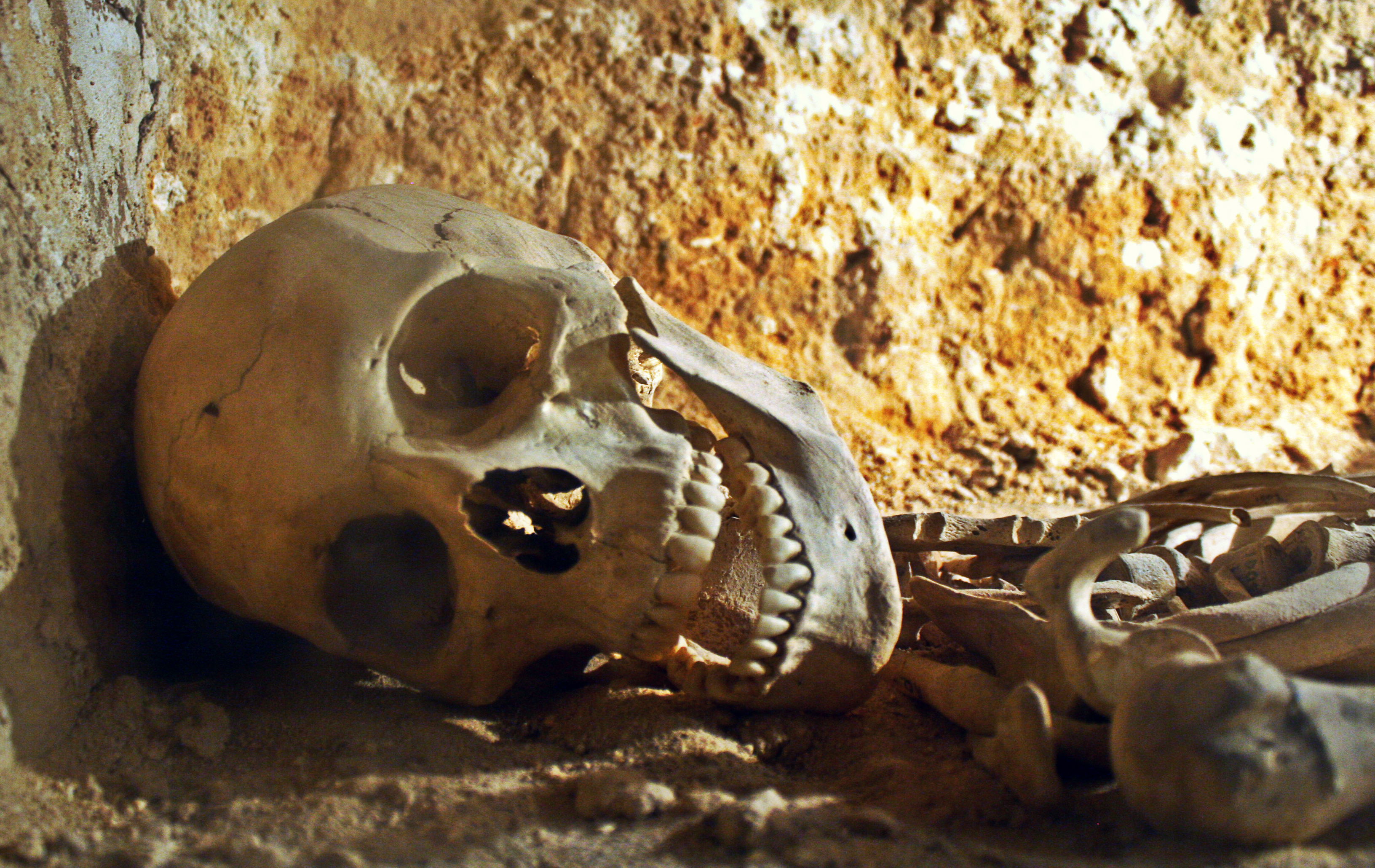 Catacombes chrétiennes, Sousse